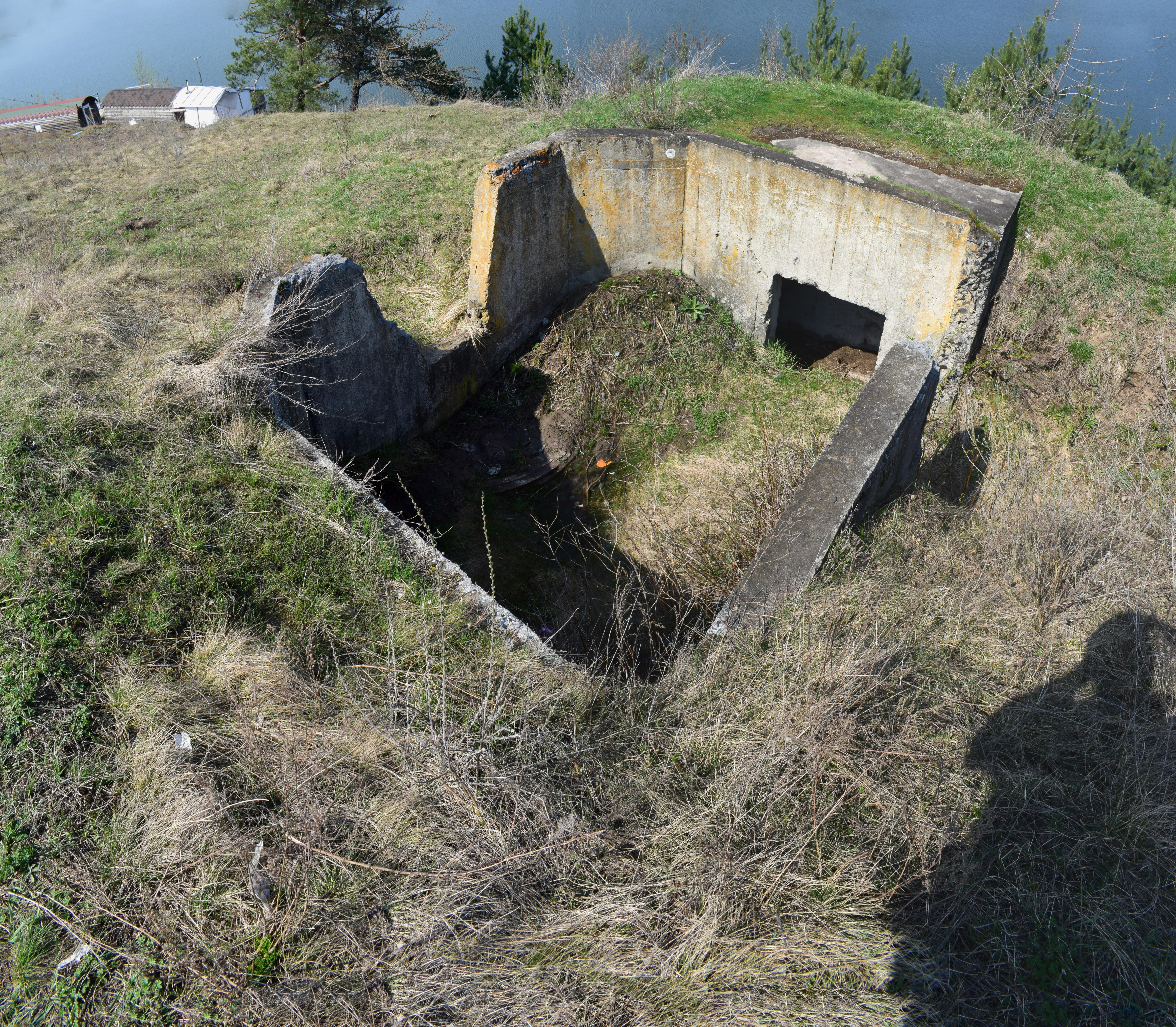 Комплекс військово-інженерних споруд Київського укріпрайону